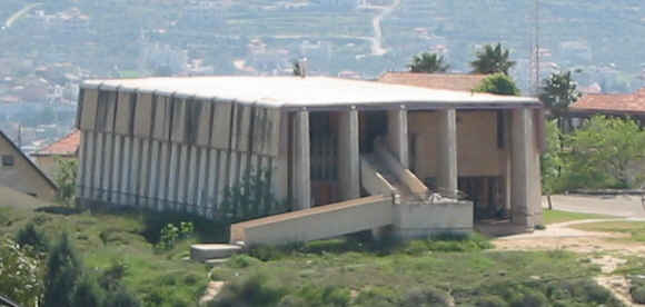 'Mishkan Shilo' synagogue ni Shilo